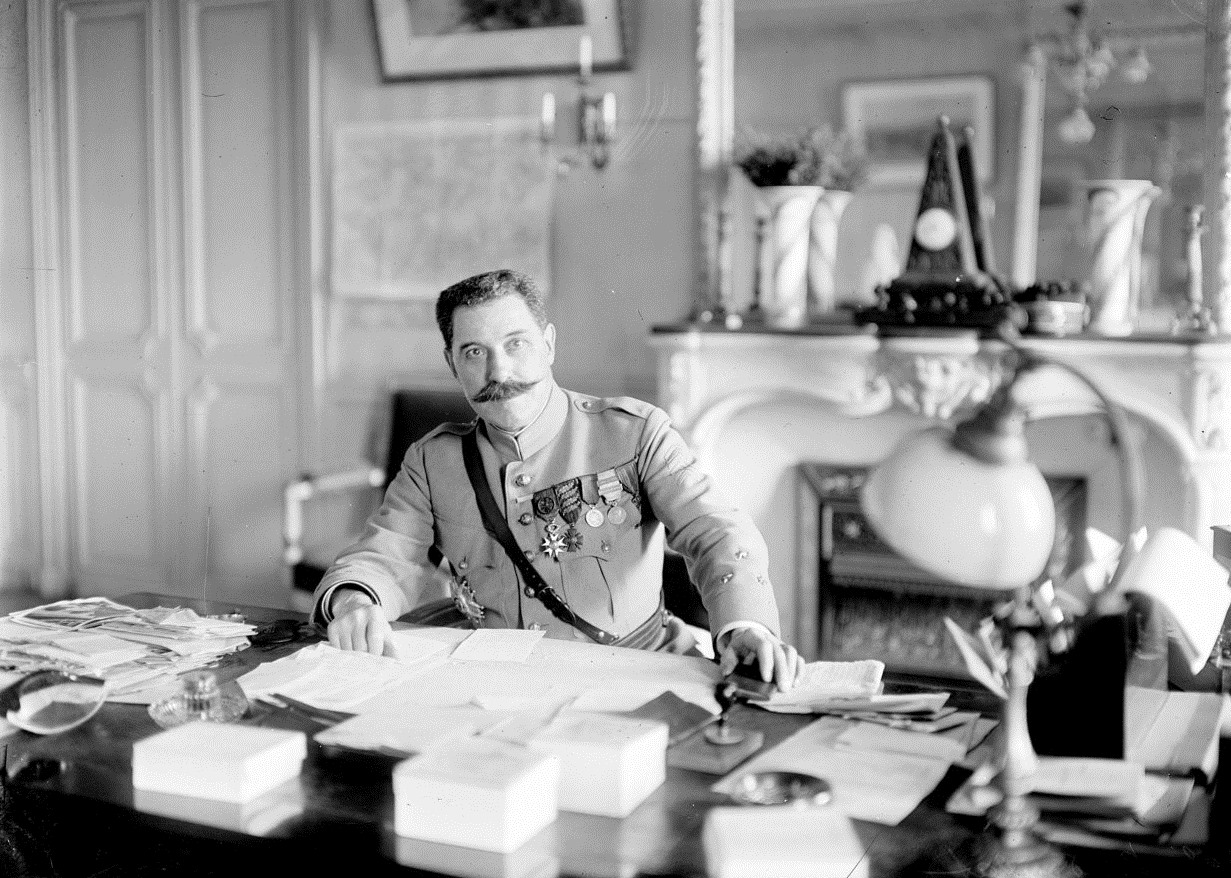 Pierre Berdoulat